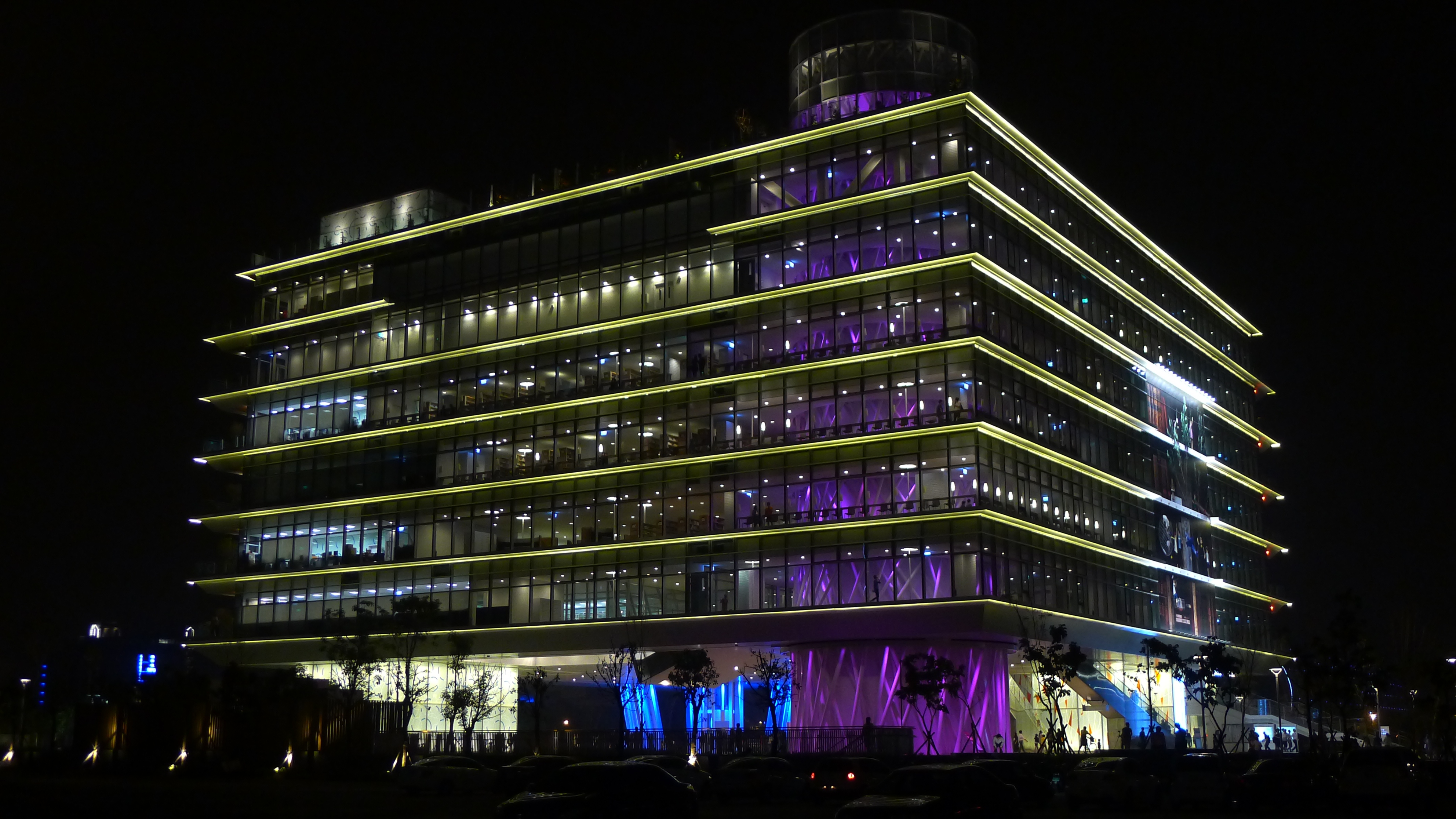 高雄市立圖書館總館夜景